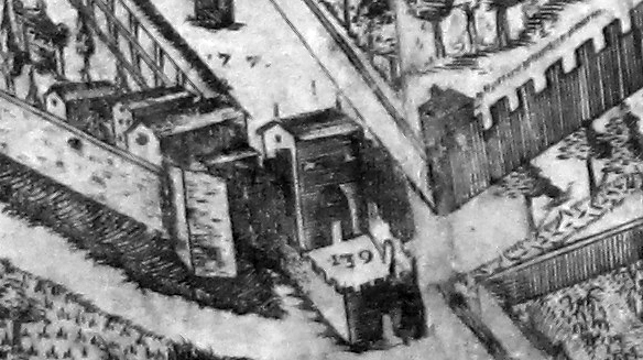 Pianta del buonsignori, dettaglio 139 porta san pier gattolini